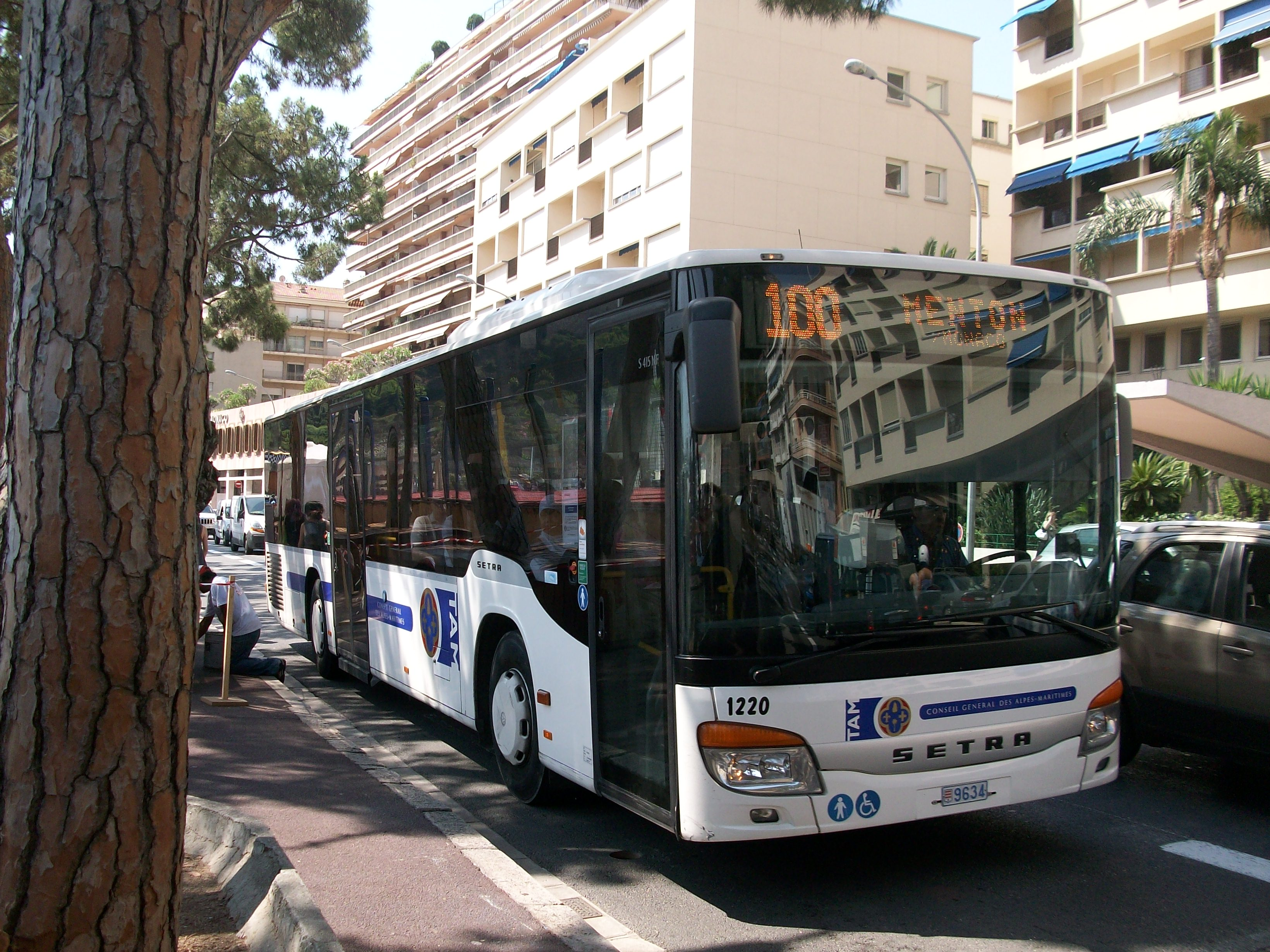 Setra S 415 NF TAM (Transports des Alpes-Maritimes, Monaco